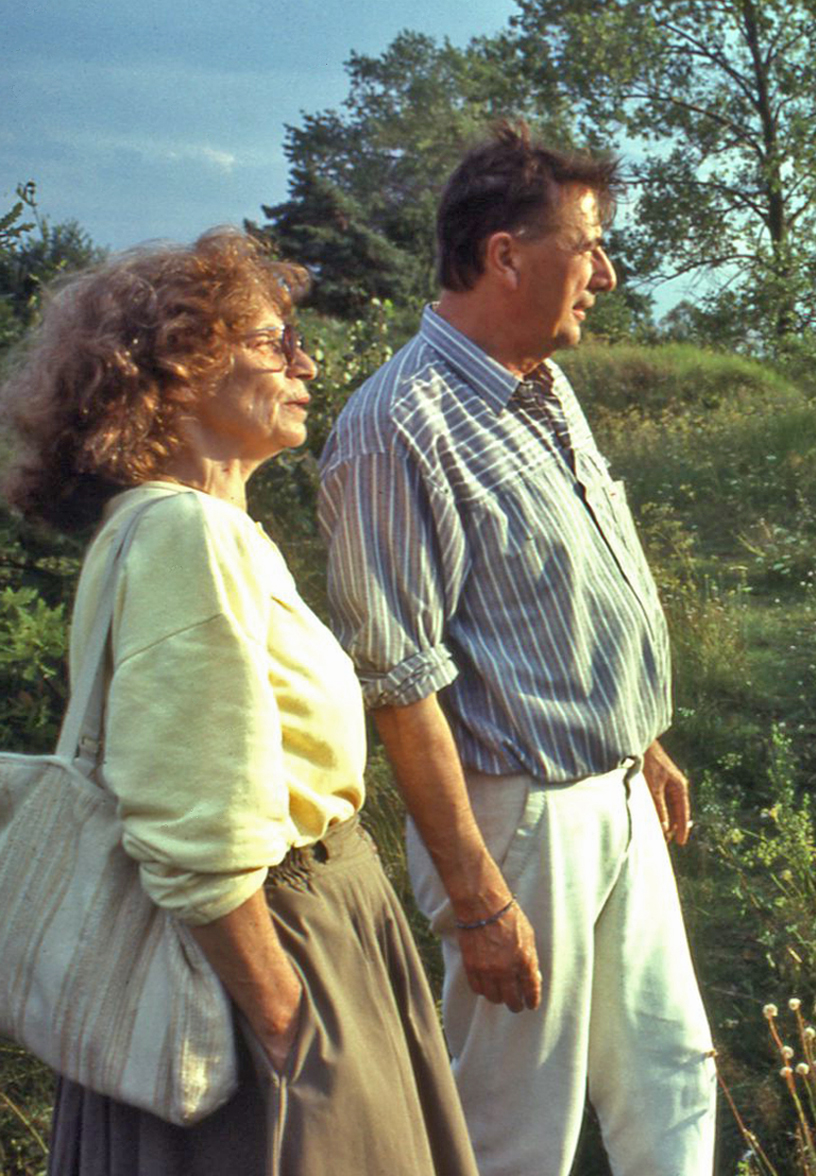 Dieter und Silvia Schlenstedt im August 1993 auf der Insel Usedom